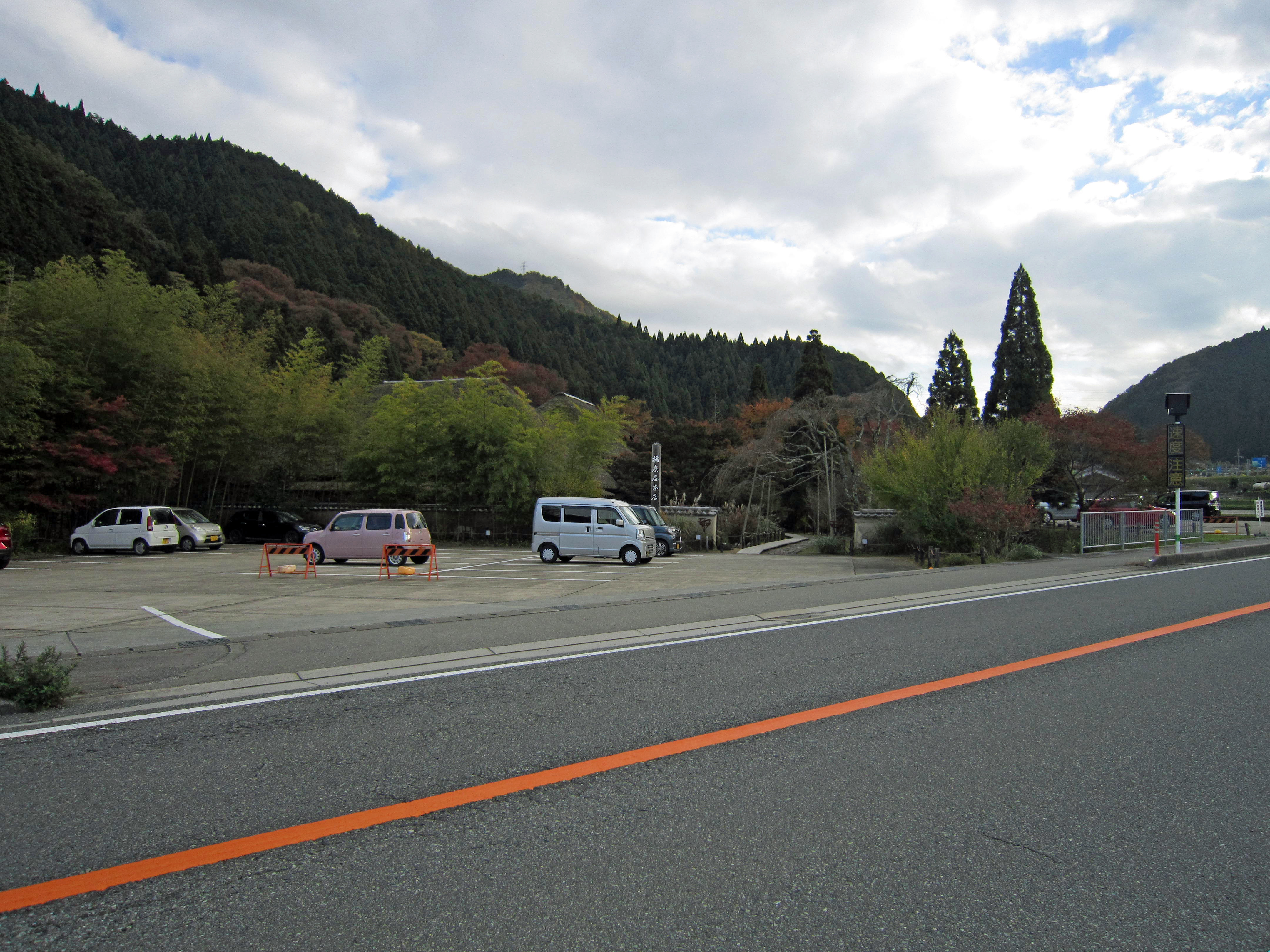 兵庫県朝来市にある株式会社播磨屋本店の生野総本店。